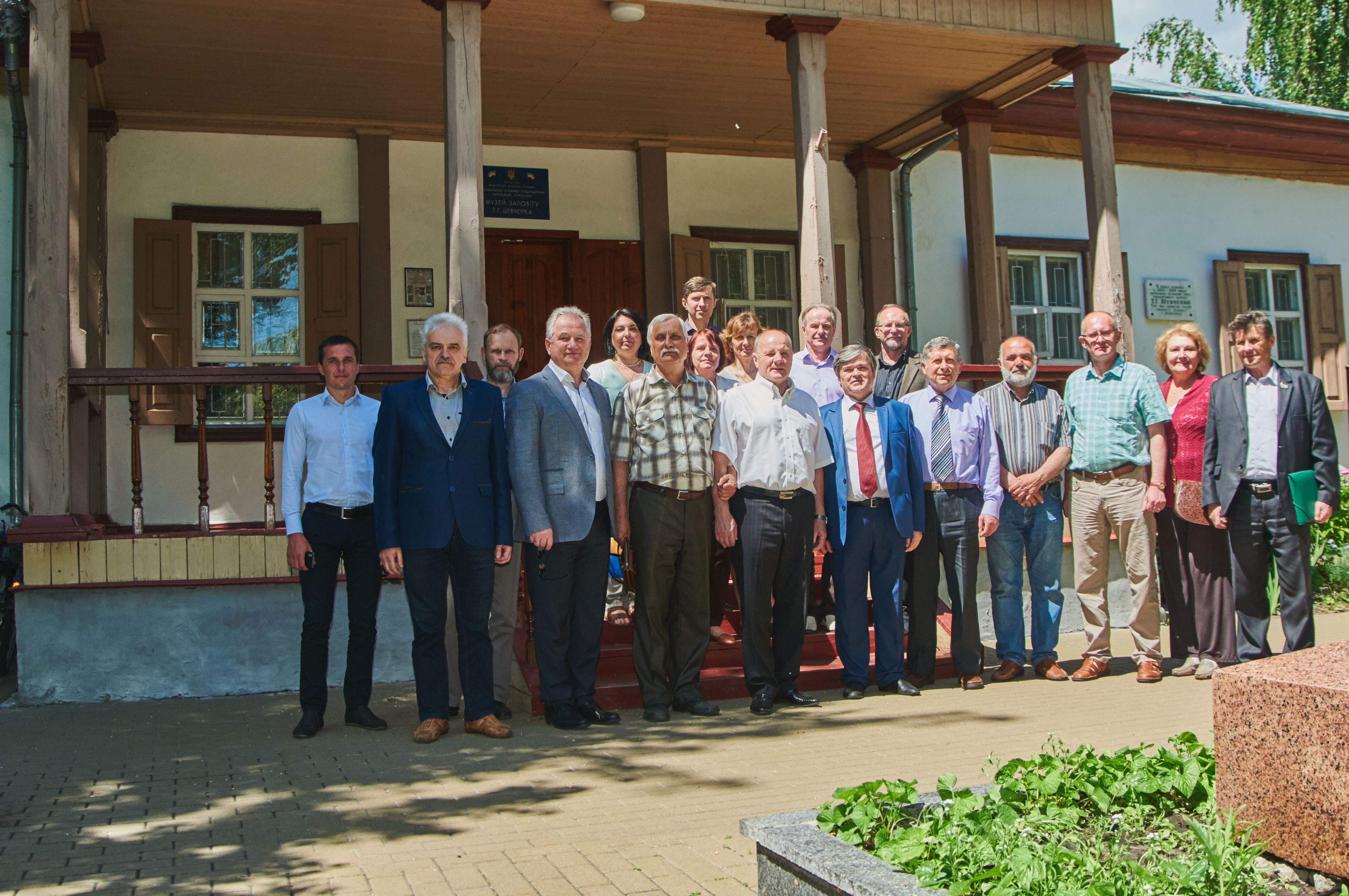 Делегація Національної спілки краєзнавців України біля будівлі музею “Заповіту” Тараса Шевченка в місті Переяслав-Хмельницький (візит у рамках святкування Всеукраїнського дня краєзнавства, 28 травня 2017 р.)